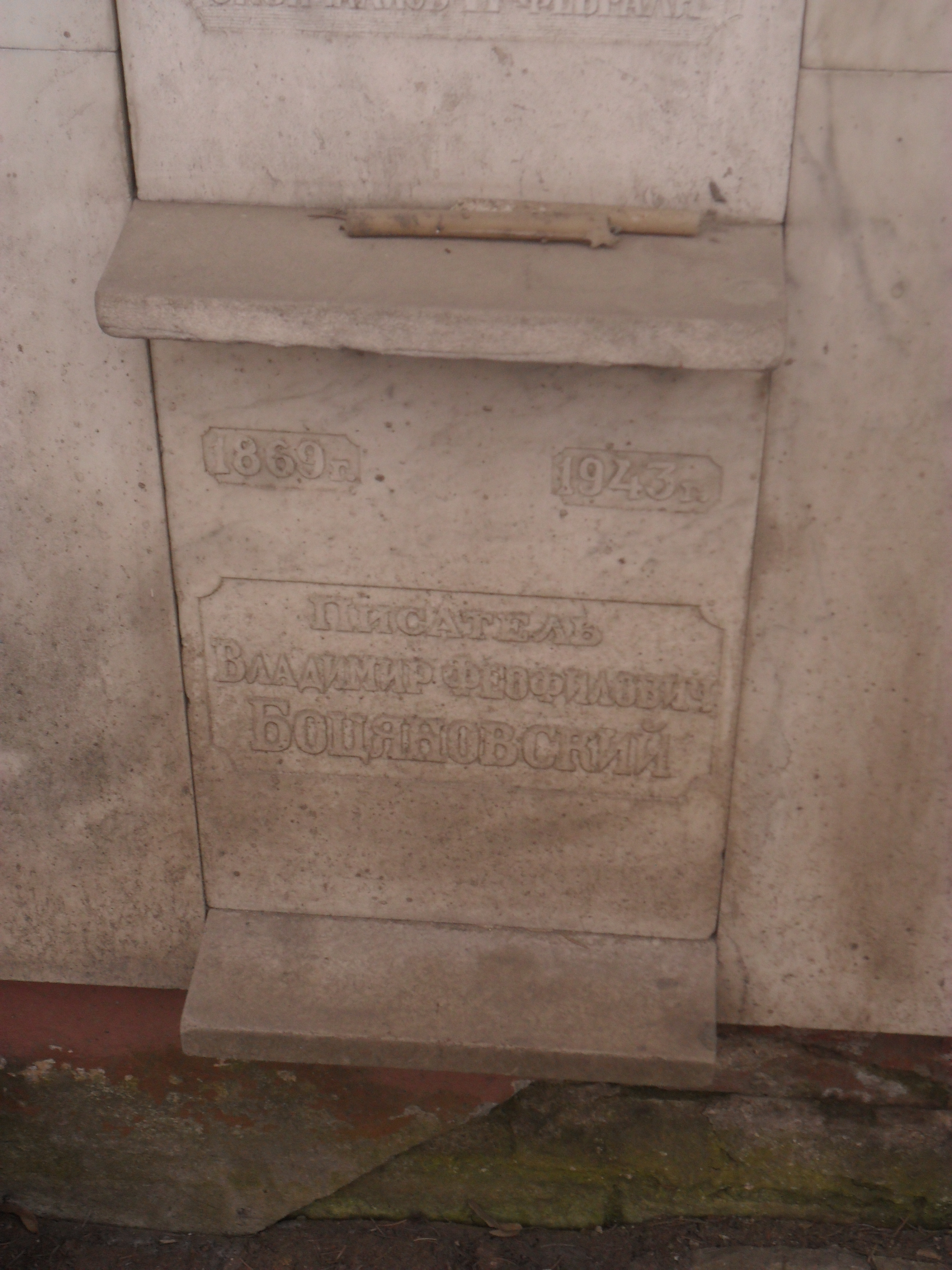 Плита колумбария писателя Владимира Боцяновского на Новодевичьем кладбище Москвы.